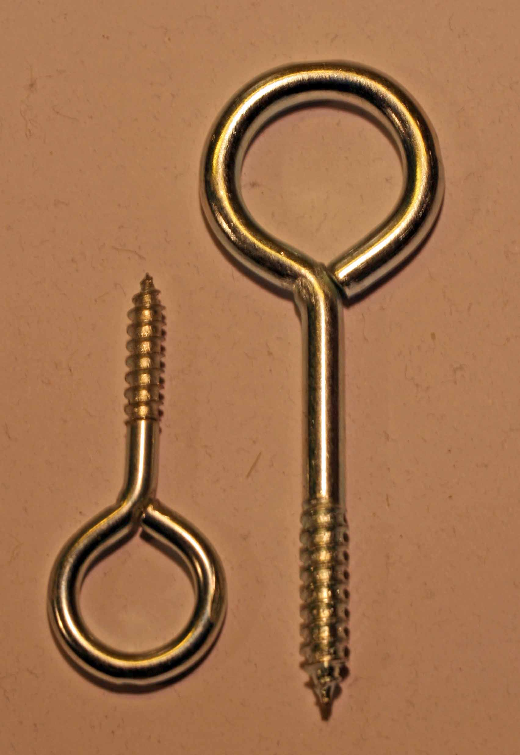 RAN HO.